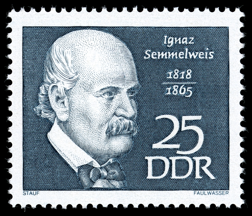 Ausgabepreis: 25 Pfennig First Day of Issue / Erstausgabetag: 17. Juli 1968 Auflage: 4.500.000 Entwurf: Stauf Druckverfahren: Stichtiefdruck Michel-Katalog-Nr: Ländercode-MiNr: 1389